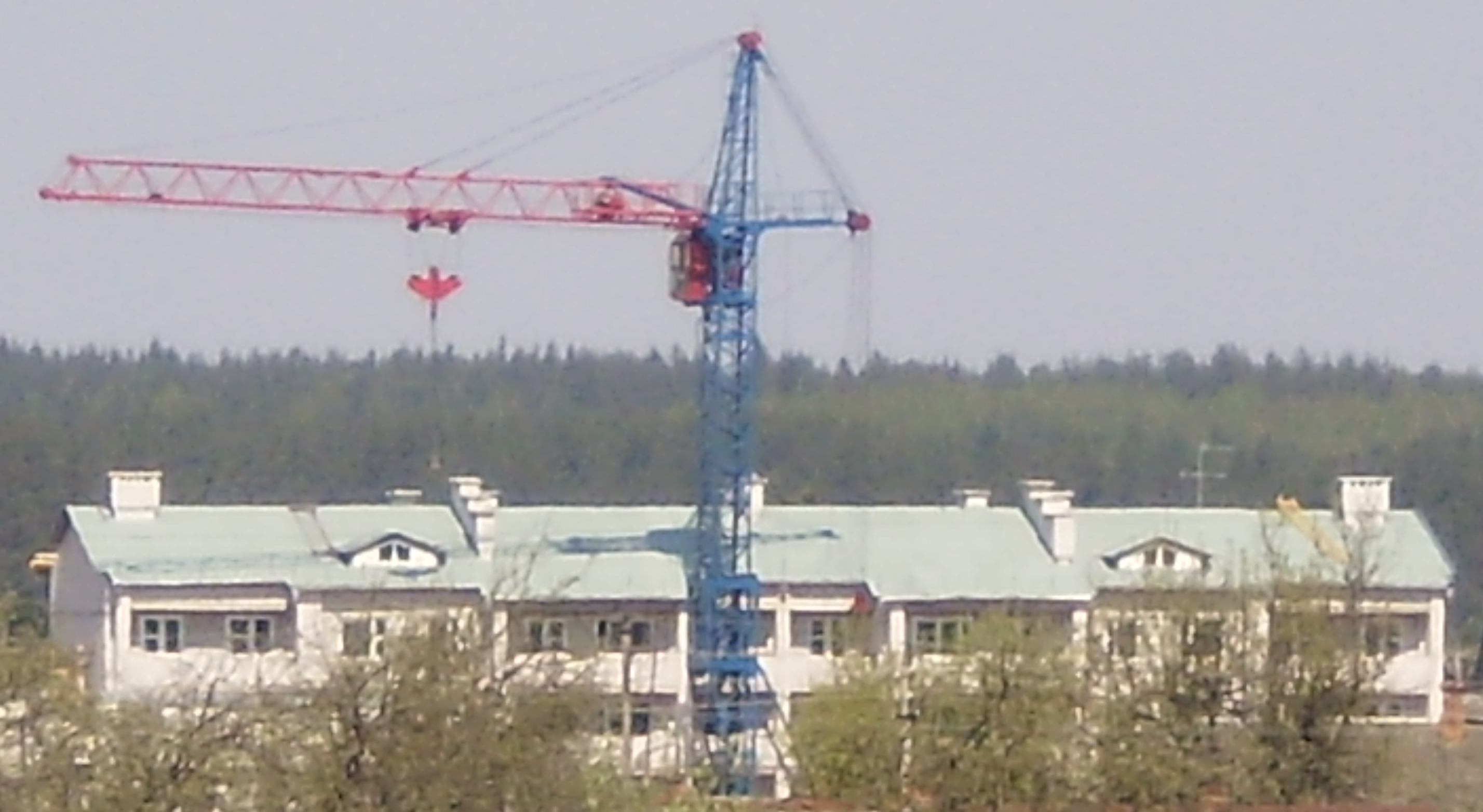 Строящийся дом в Бегомле (похоже, что это не Бегомль а Докшицы)